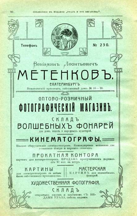 Рекламный буклет фотографического магазина Метенкова, Екатеринбург, начало 20 века.